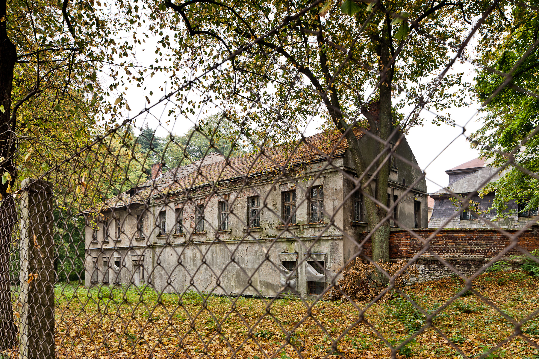 Zespół pałacowy Potockich - pałac (tzw. nowy), Krzeszowice - zabudowania gospodarcze